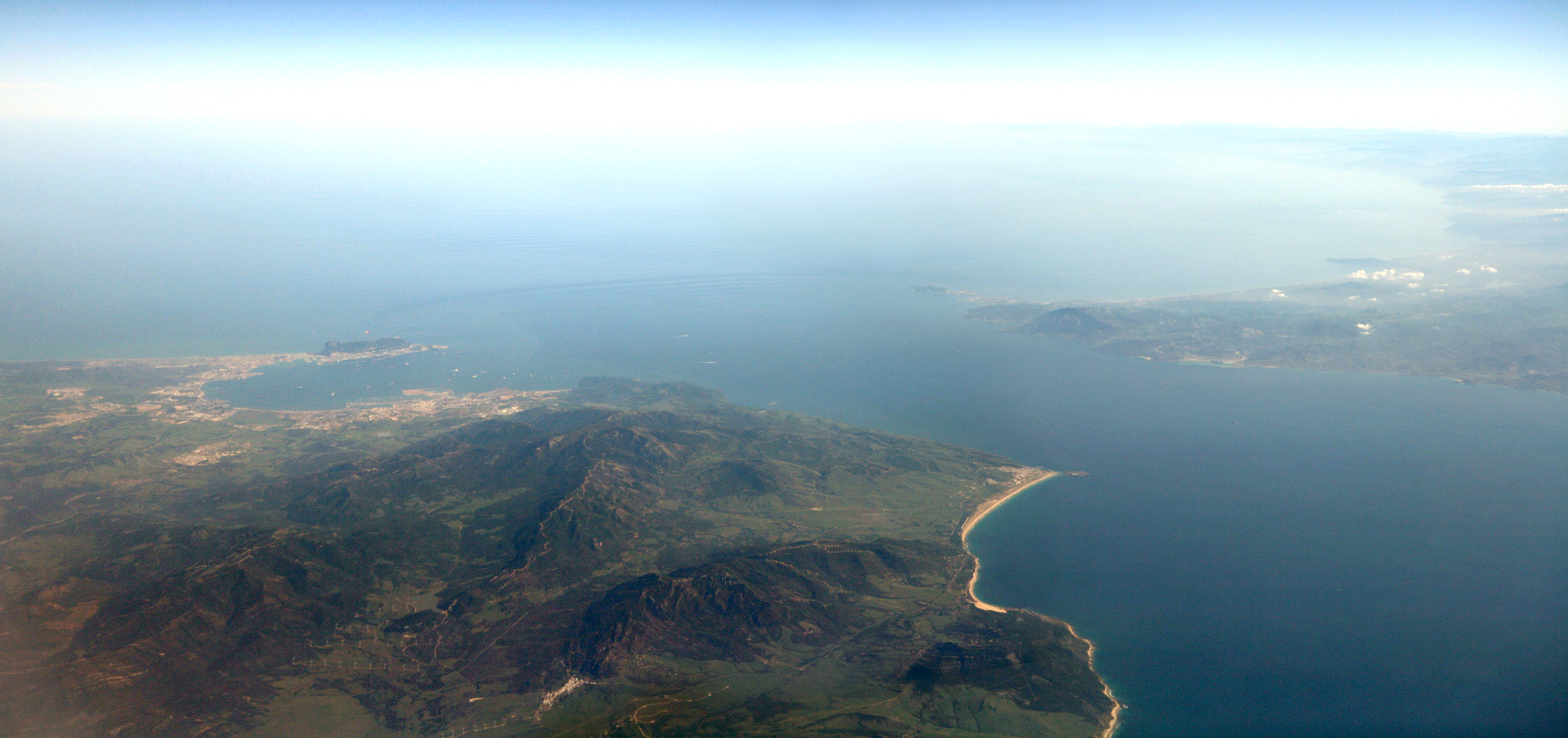 Le détroit de Gibraltar vu d'avion